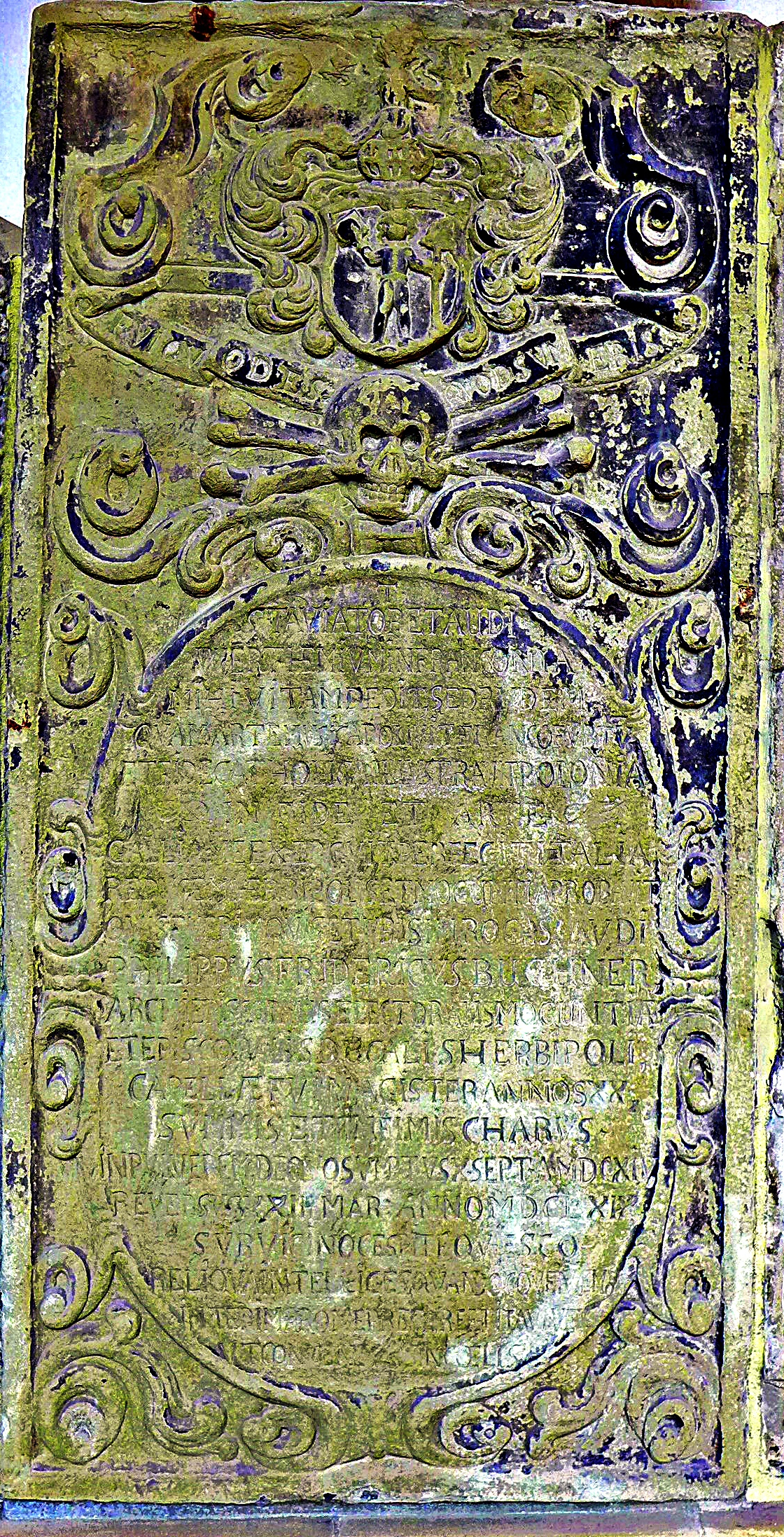 Domkreuzgang Würzburg, Grabplatte Philipp Friedrich Buchner, erzbischöflich Mainzer und fürstbischöflich Würzburger Kapellmeister (1614-1669)